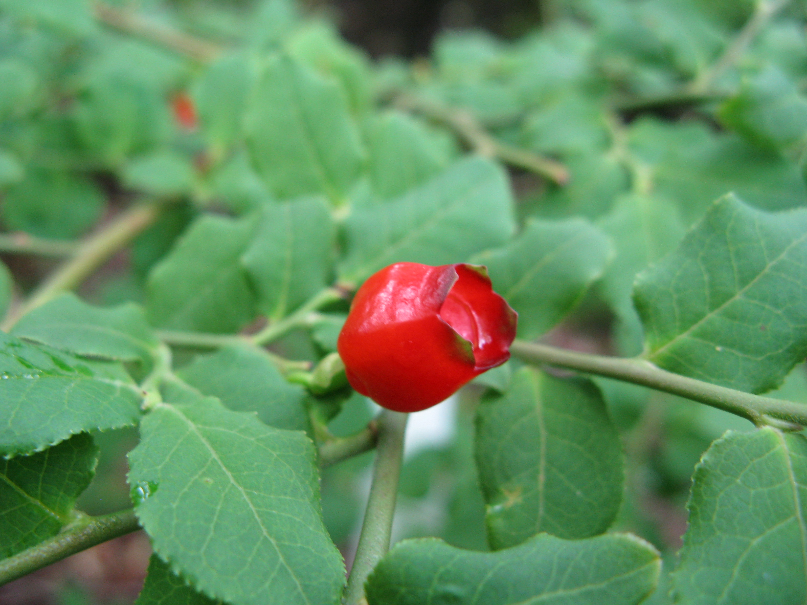 Scientific name Vaccinium hirtum